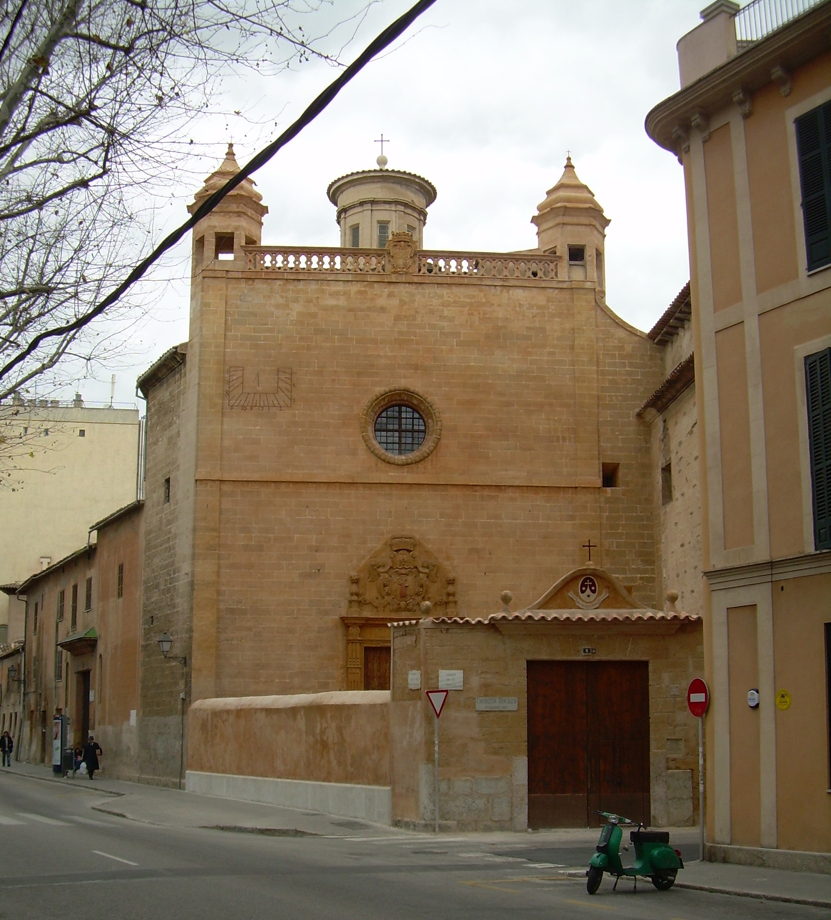 Convent de Santa Teresa, Palma (Mallorca)